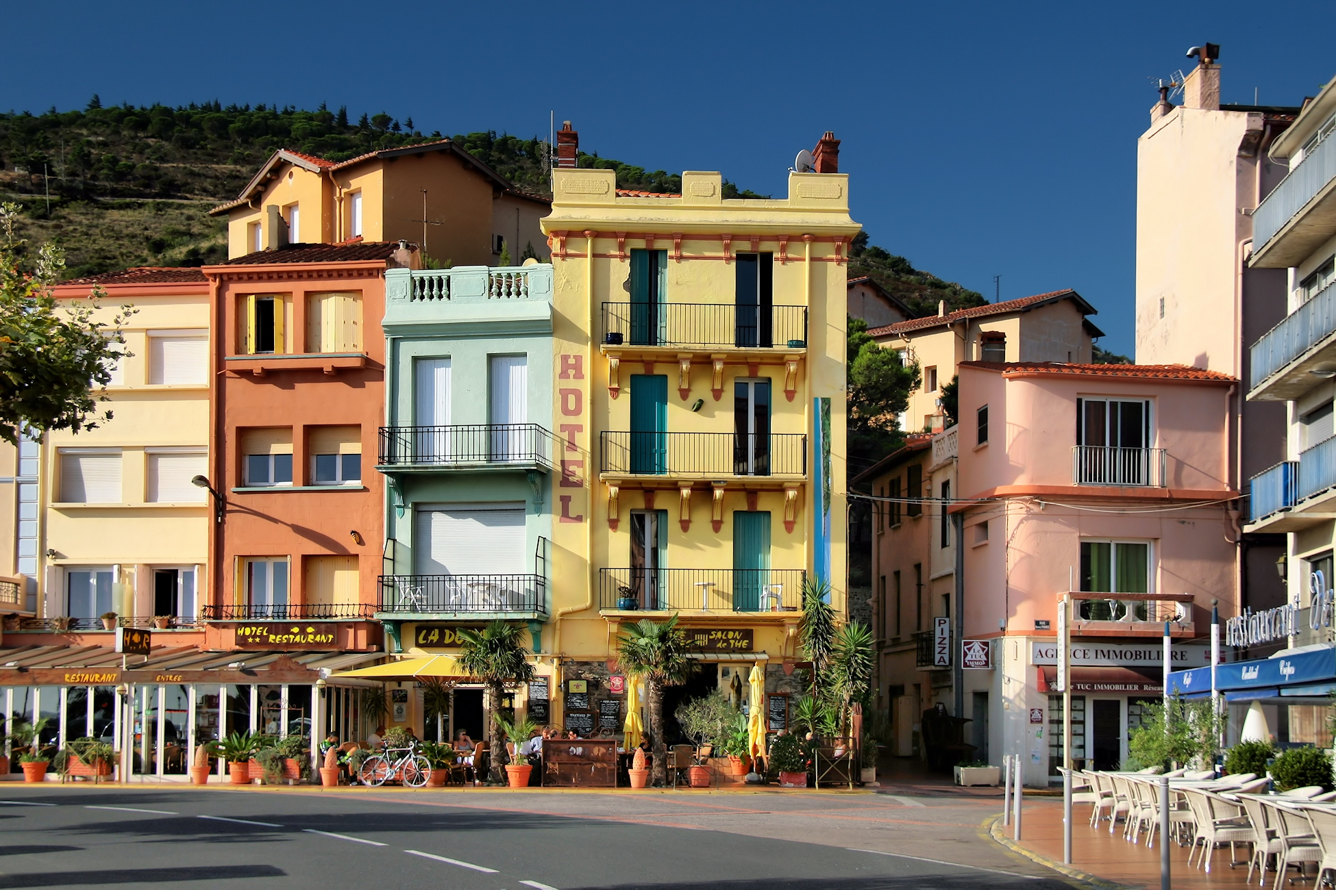 Cerbère